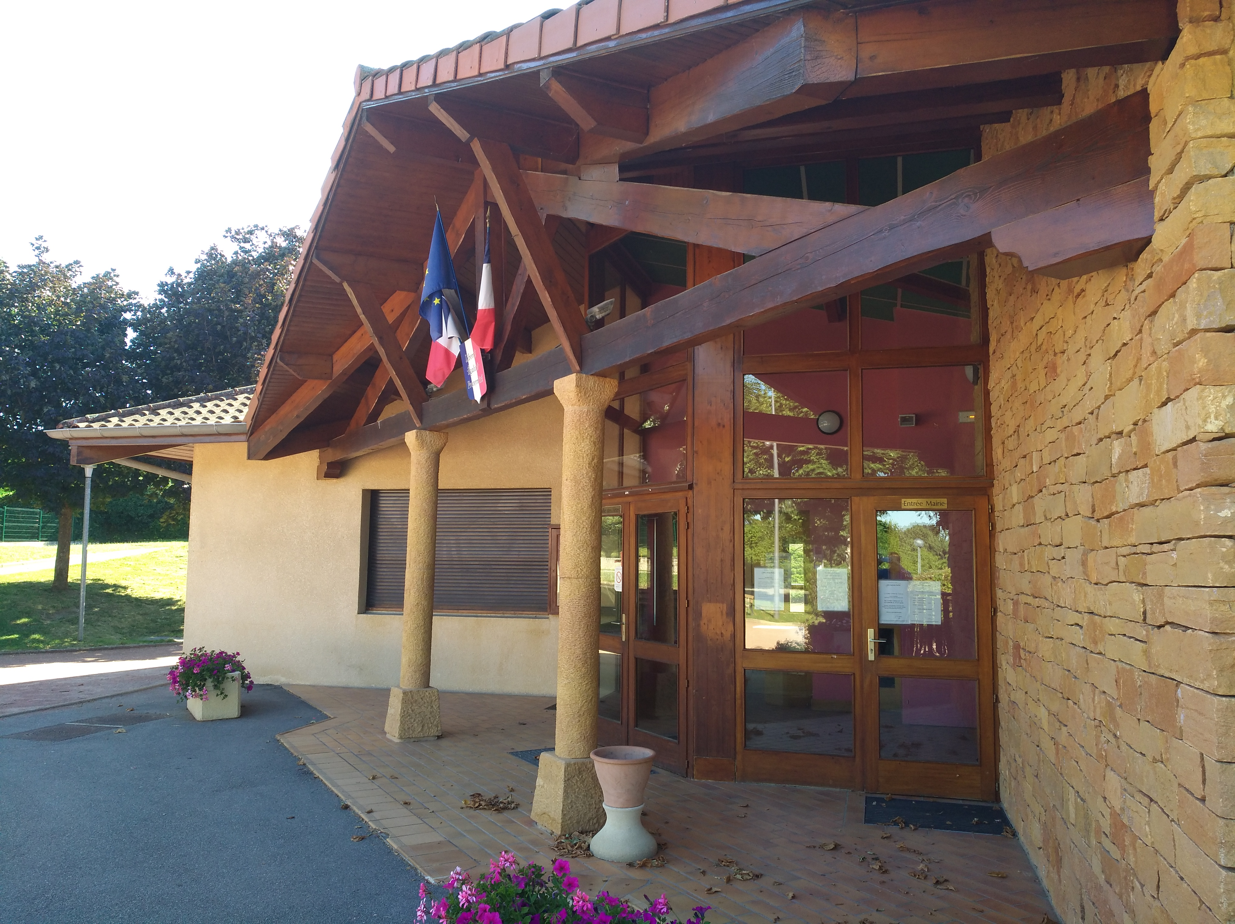 Entrée de la mairie annexe de Nuelles (commune de Saint-Germain-Nuelles, Rhône, France).